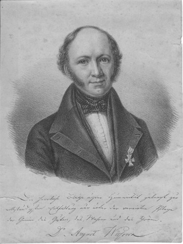 August Wissowa (1797–1868), Gymnasialdirektor in Breslau. Porträtzeichnung im Besitz der Berlin-Brandenburgischen Akademie der Wissenschaften, 16,2 × 21,4 cm